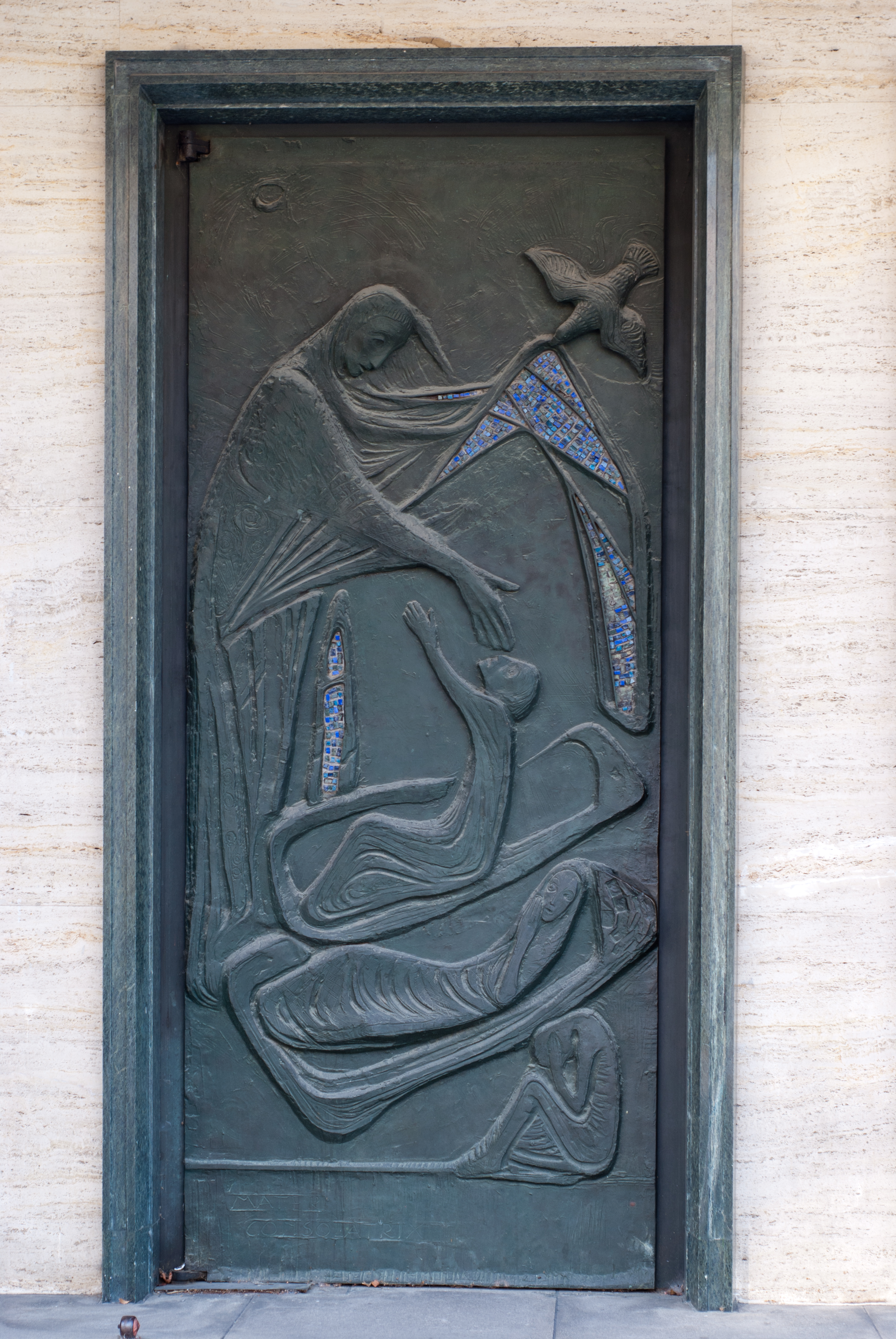 Pfarrkirche Wattens, linke Eingangstür